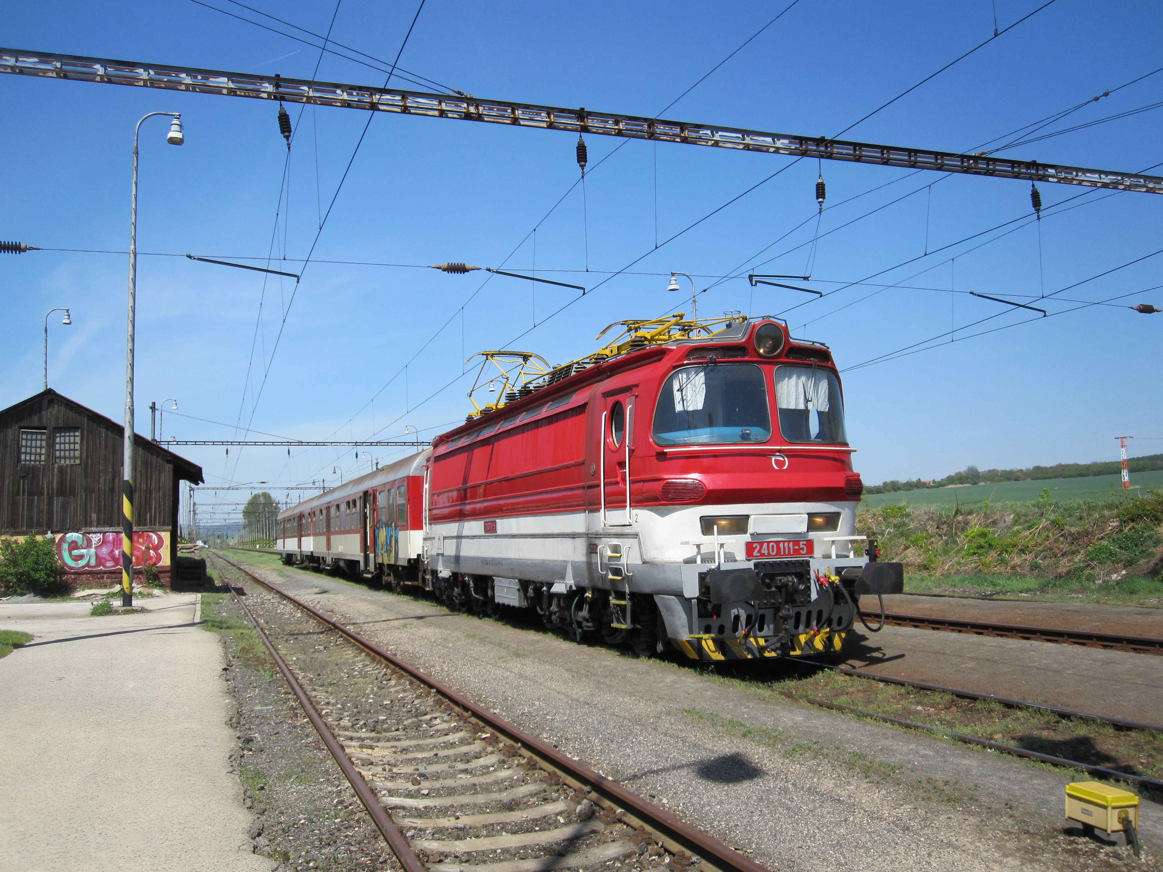 Vlak Železniční společnosti Slovensko s elektrickou lokomotivou 240.111, Boleráz